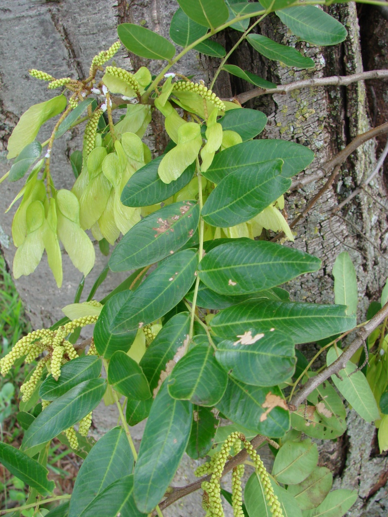 Pterogyne nitens Tul. - FABACEAE - Campus da Universidade de Brasília - Distrito Federal - Brasil.